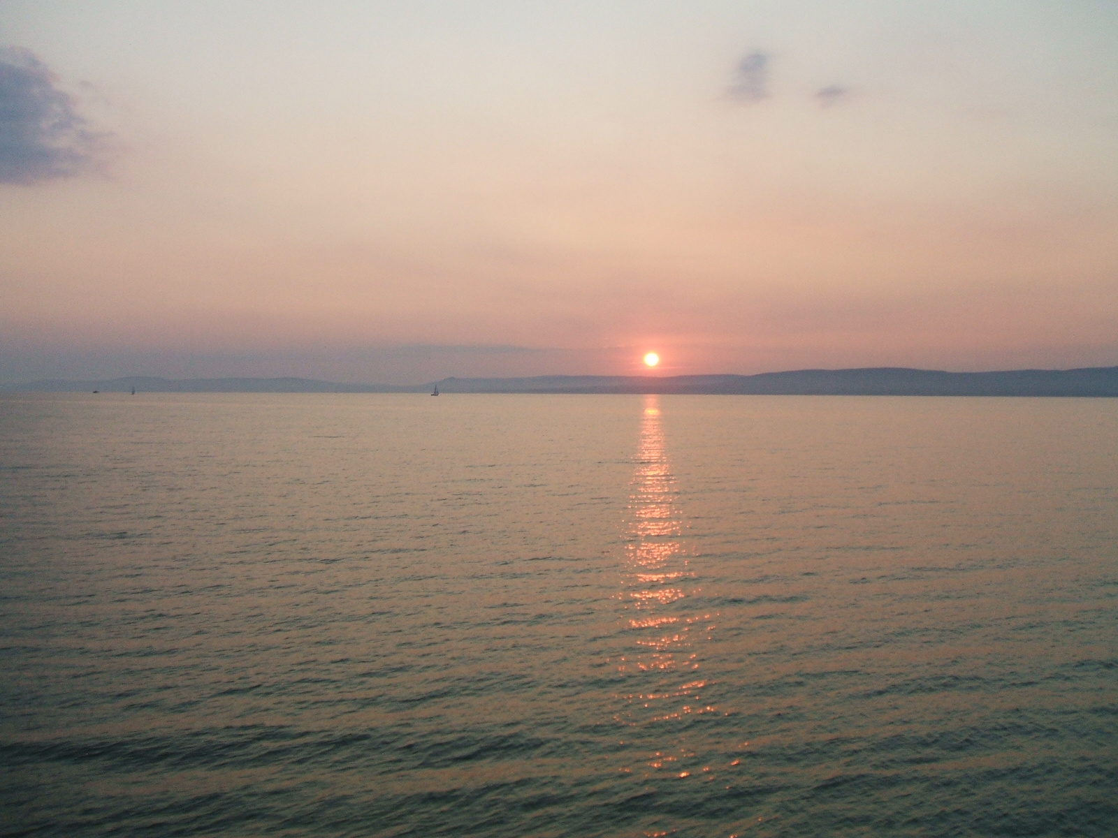 sunset, Balaton, Hungary